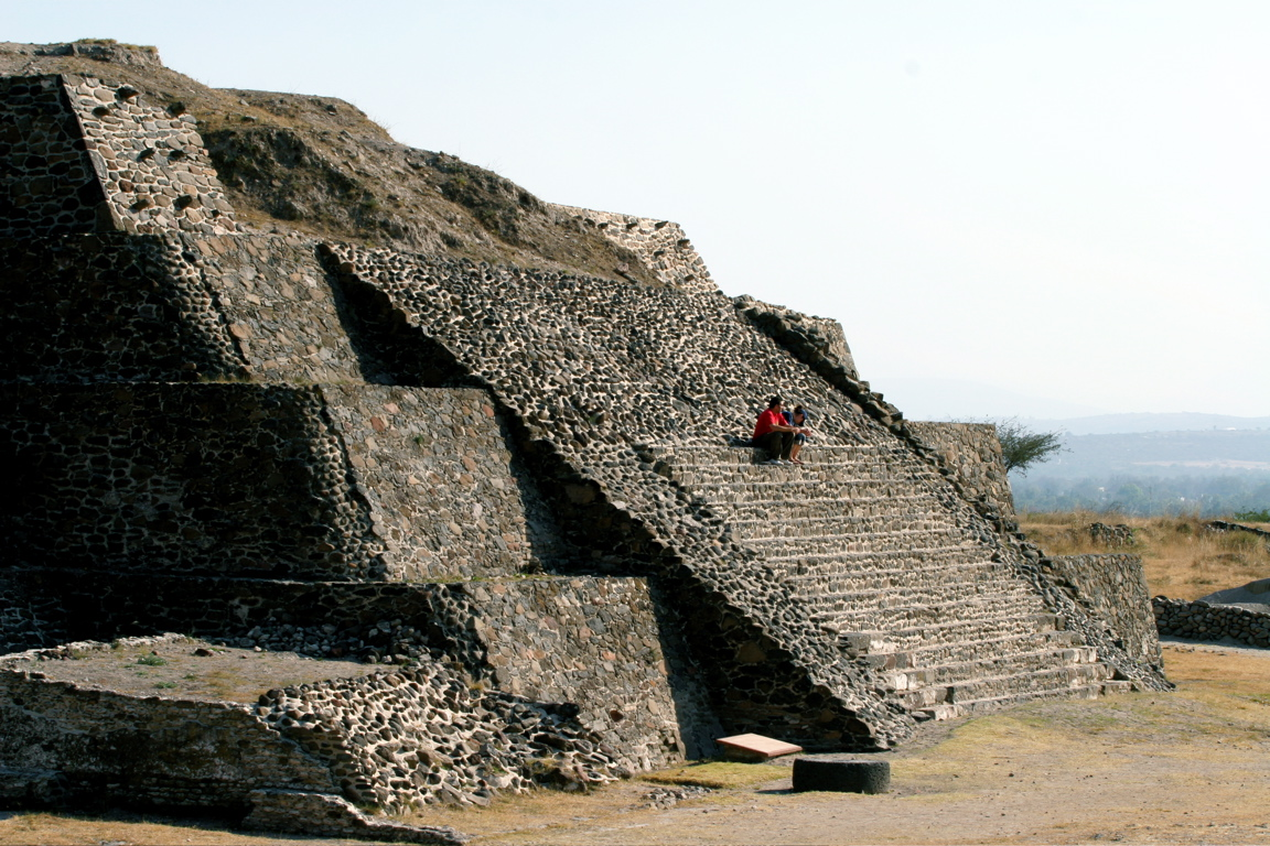 Pirámide de Tlahuizcalpantecuhtli, en la zona arqueológica de Tula, Hidalgo, México